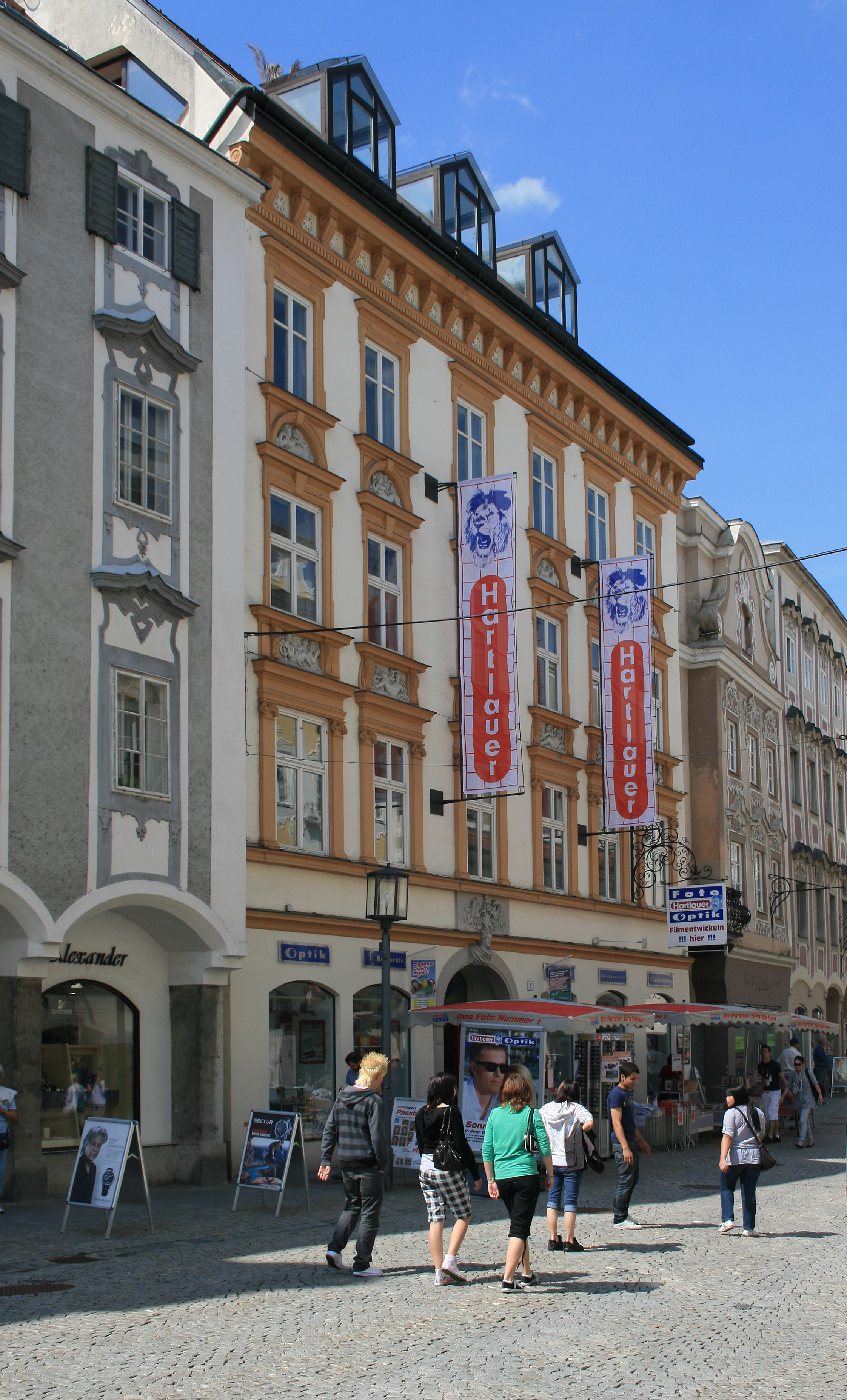 Das Hartlauer Haupthaus am Steyrer Stadtplatz Nr. 6